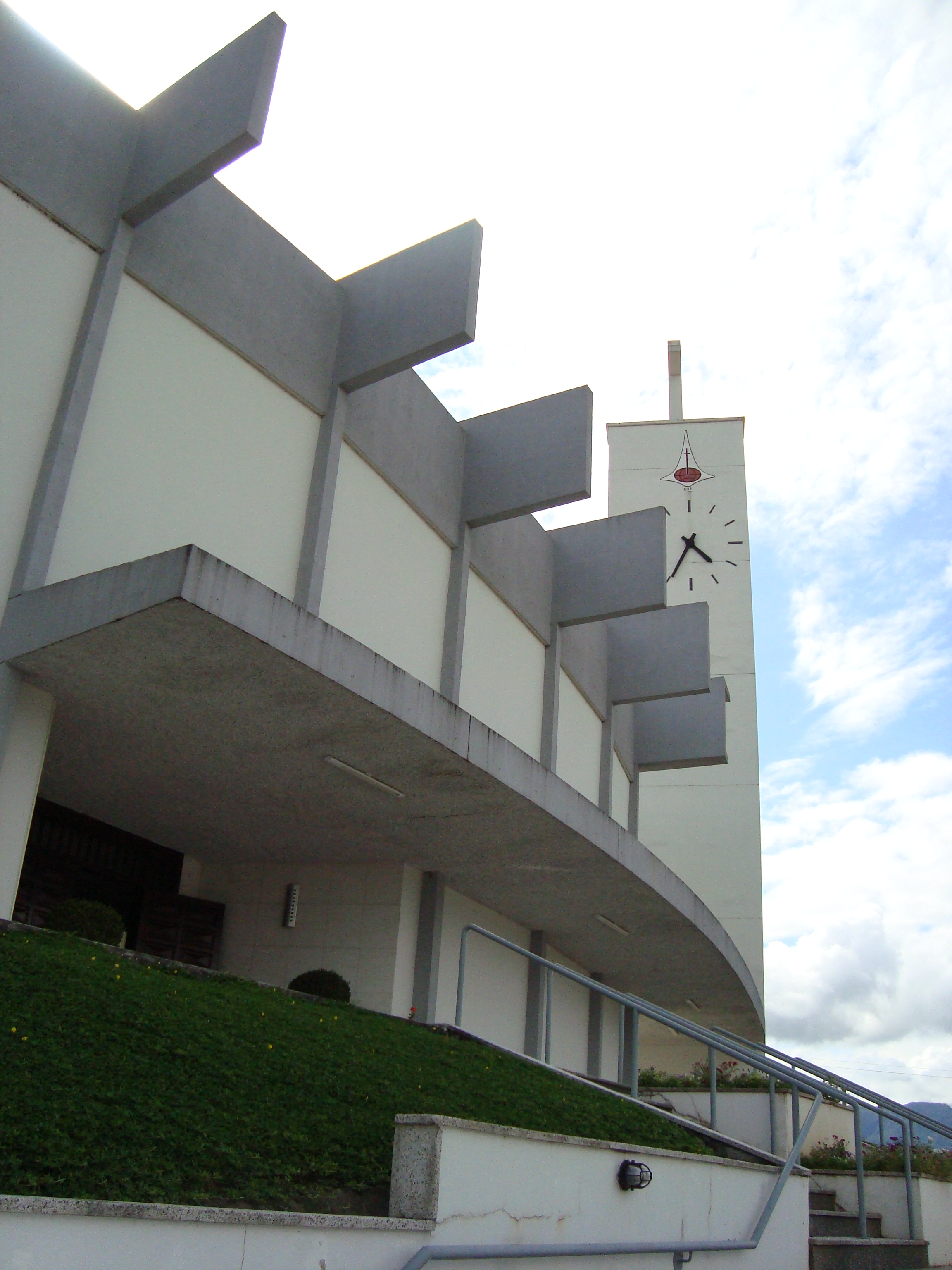 Igreja da Ressurreição Timbó. IECLB